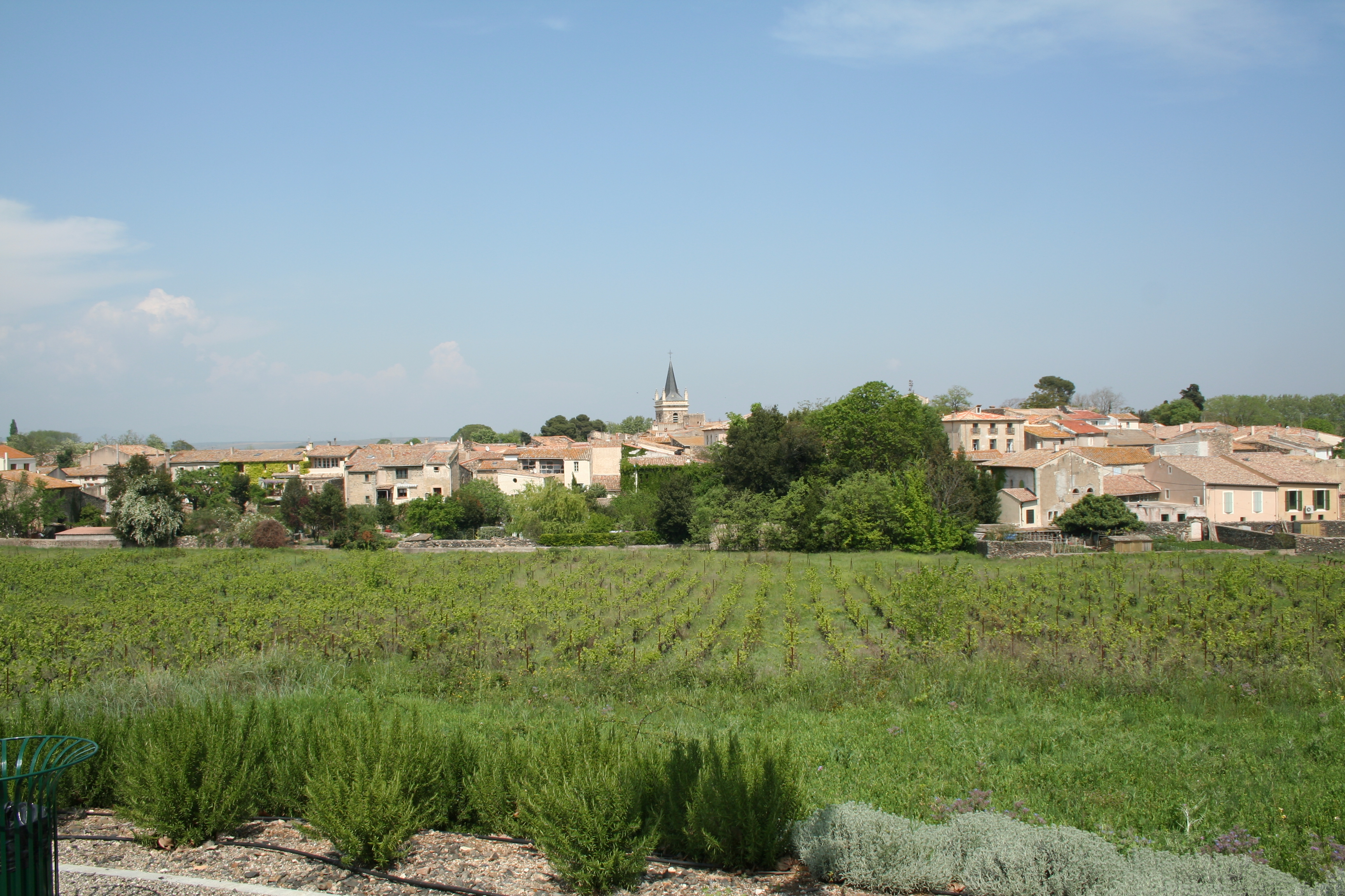 Nizas (Hérault) - vue générale.